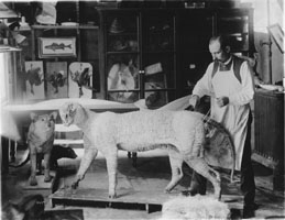 William Temple Hornaday beim Präparieren eines Tigers